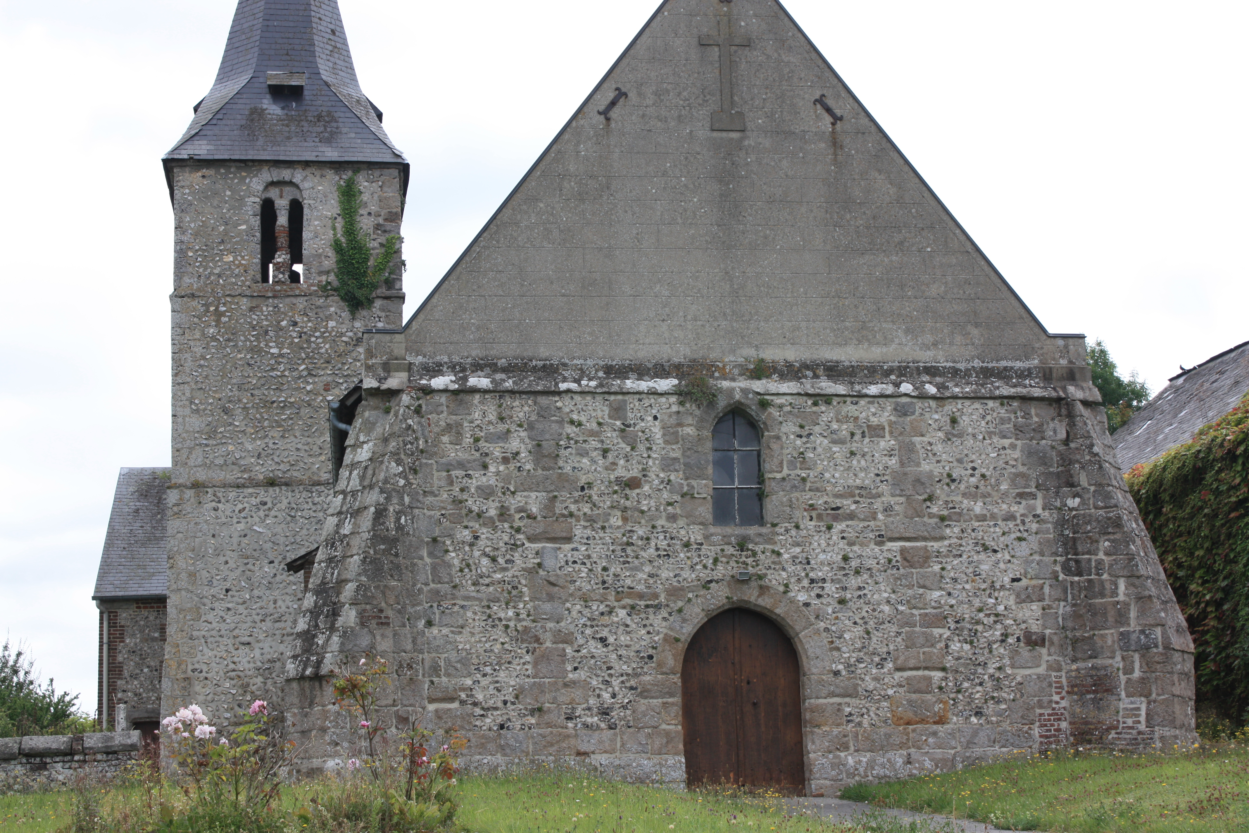 Saint-Germain-d'Étables - Eglise Notre-Dame Vue générale de l'Ouest